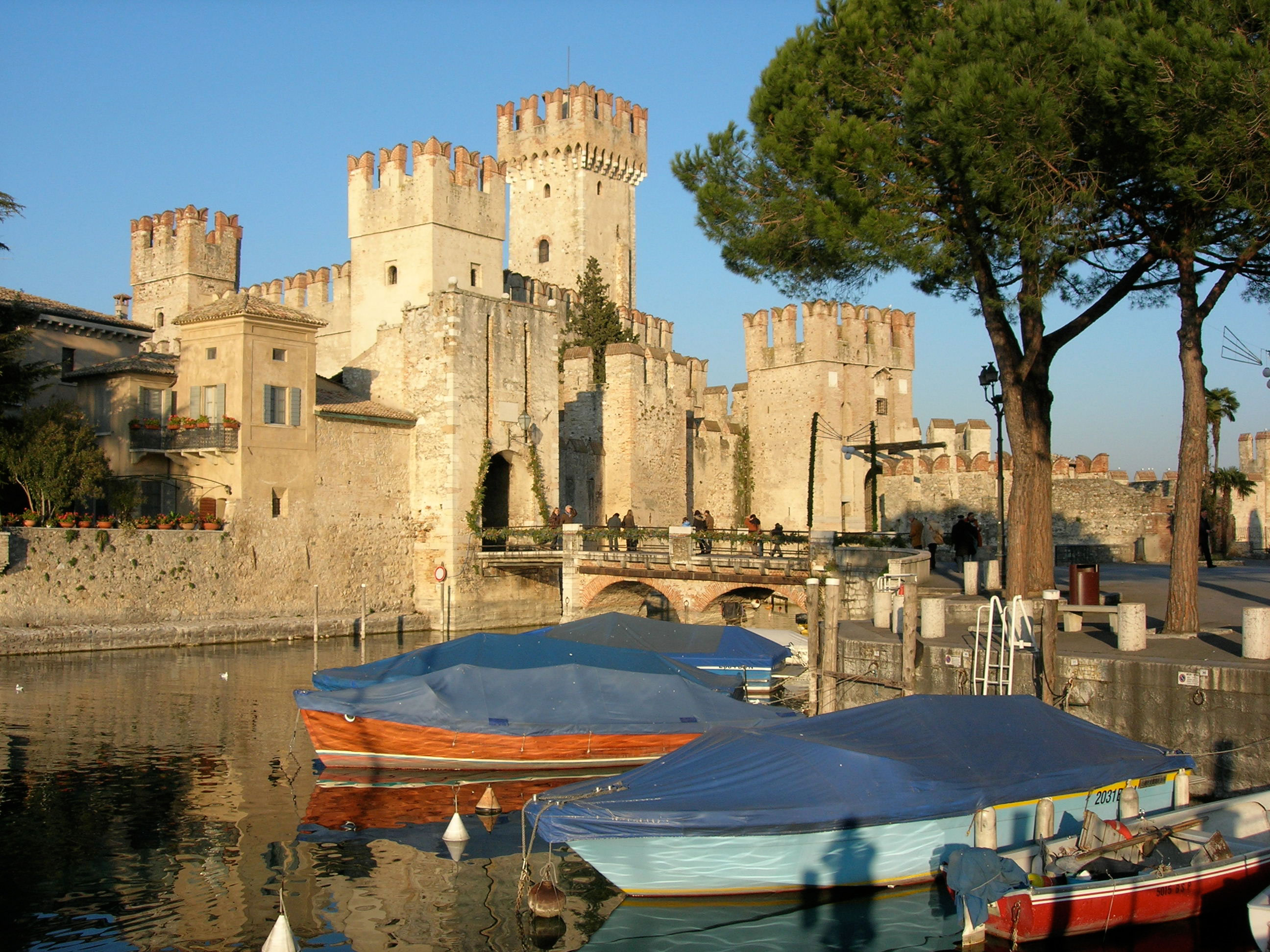 Sirmione Castle Castello, Italia